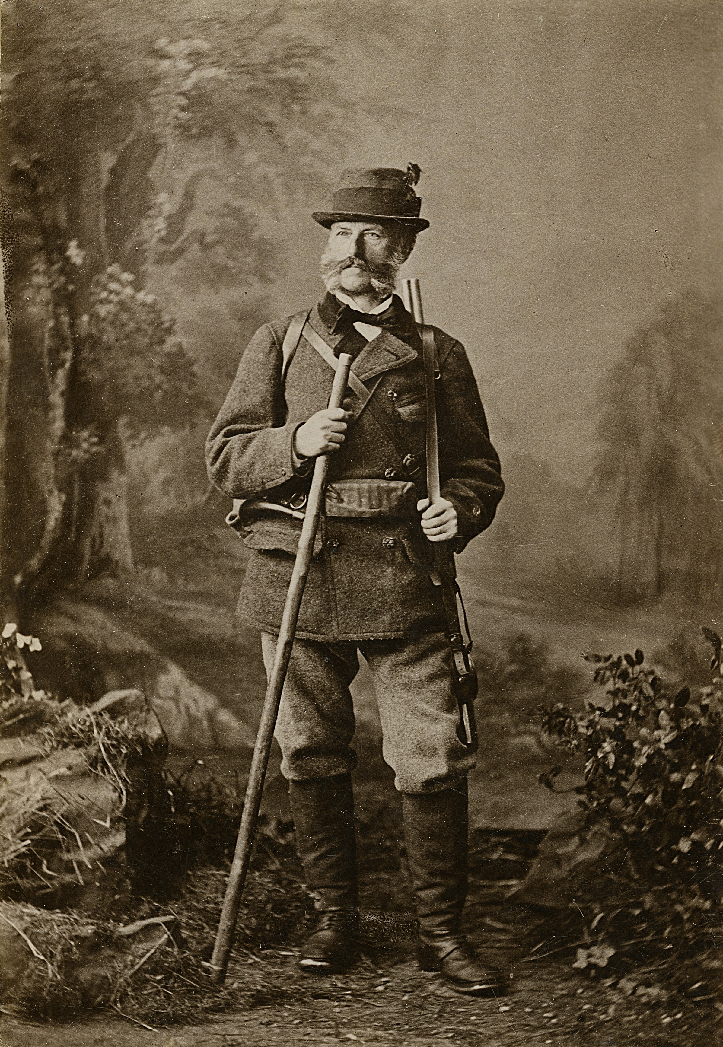 Der Textilunternehmer Johann Georg Euler-Bänziger von der Dorfhalde in Lutzenberg im Schweizer Kanton Appenzell Ausserrhoden als Jäger